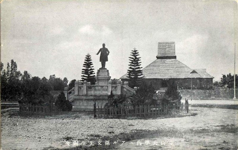 梅屋莊吉贈送之孫文銅像，位於廣州市國立中山大學（石牌，現華南理工大學），現已被遷移至康樂園中山大學（私立嶺南大學校址）。